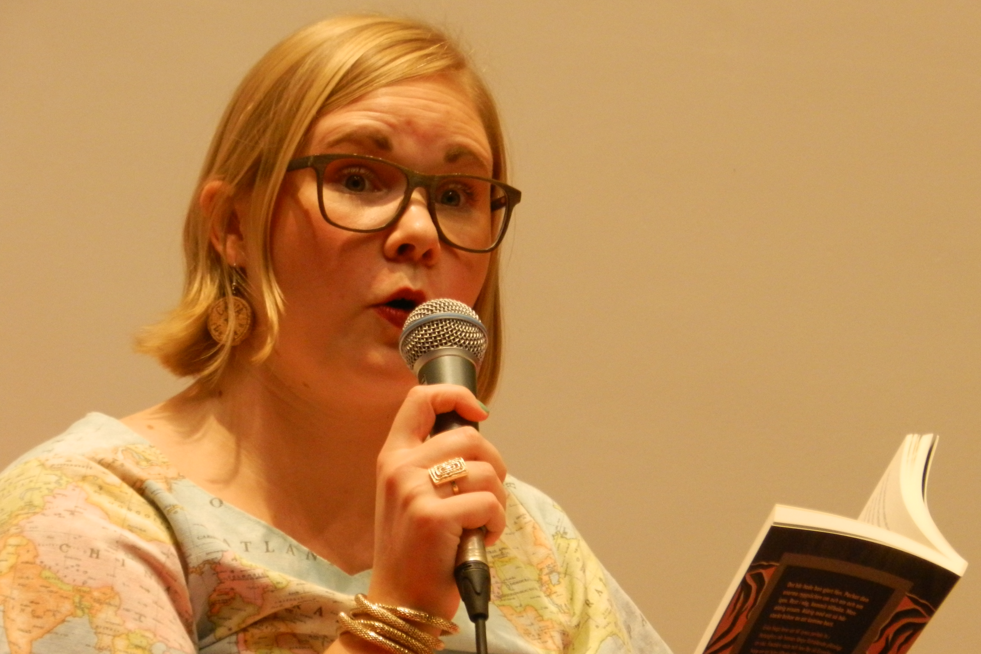 Michaela von Kügelgen på Bokmässan i Göteborg 2017.